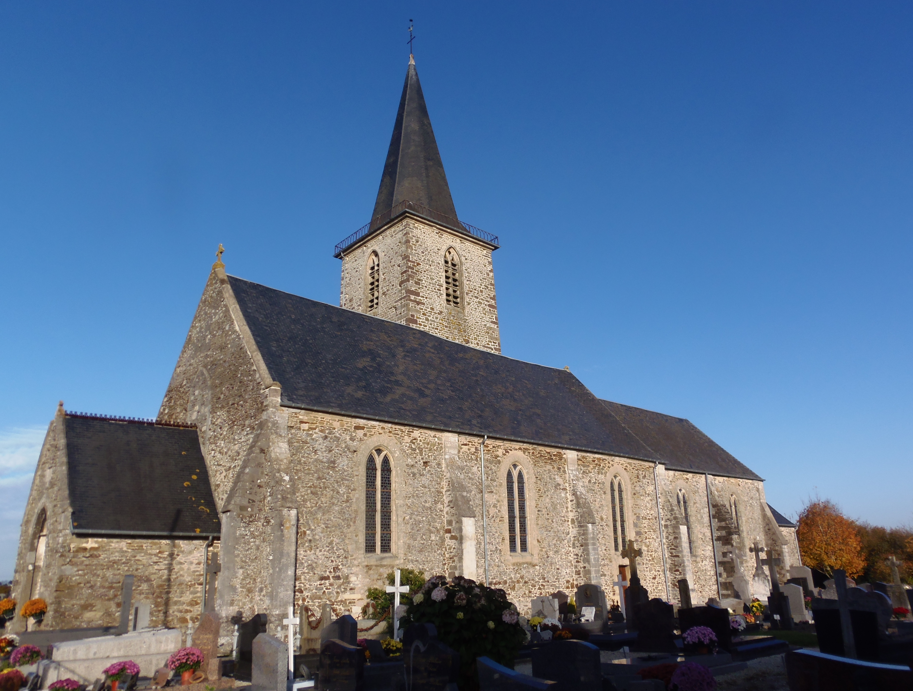 Saint-Martin-de-Bonfossé (Normandie, France). L'église Saint-Martin.